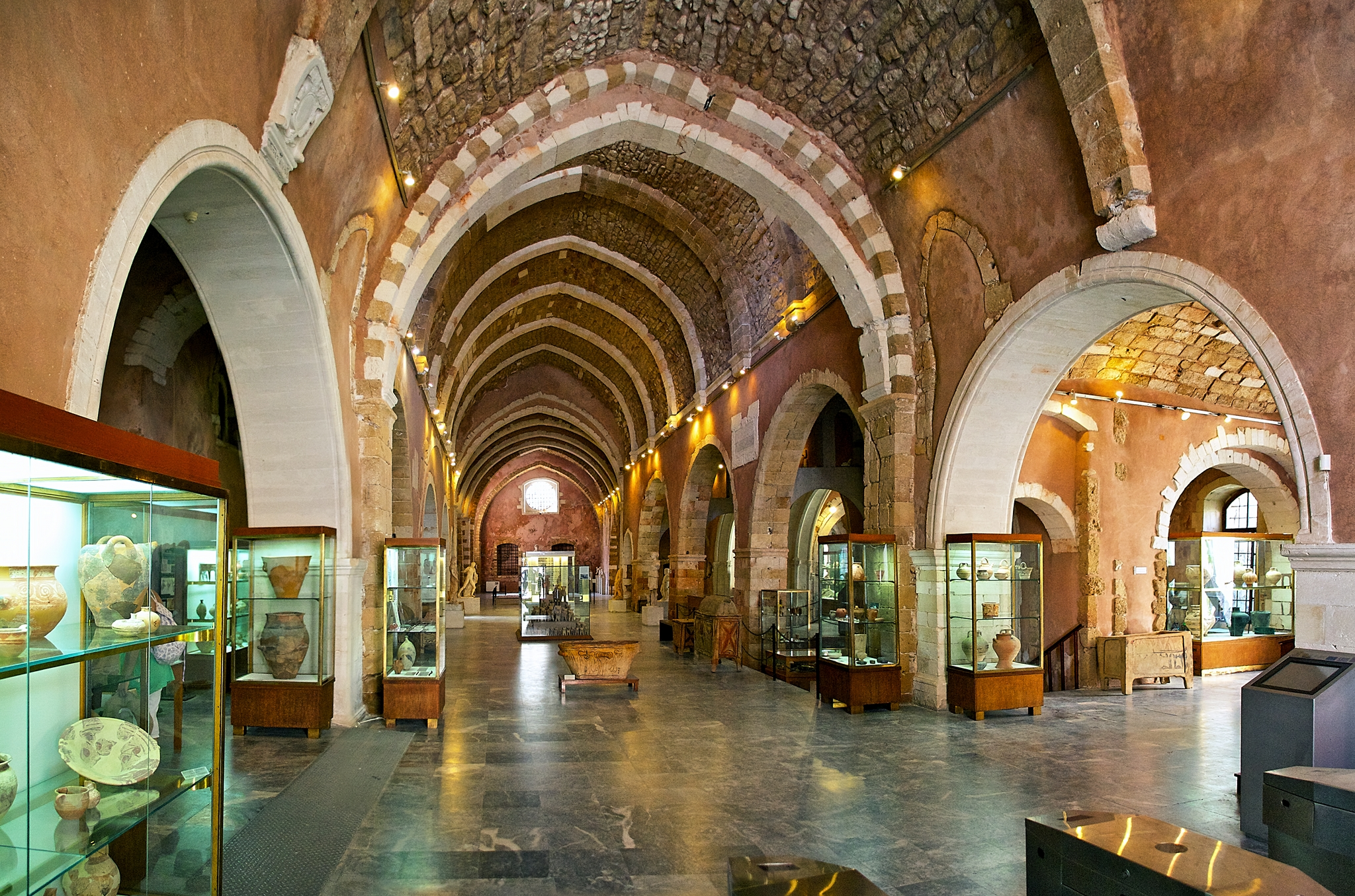 Αρχαιολογικό Μουσείο Χανίων